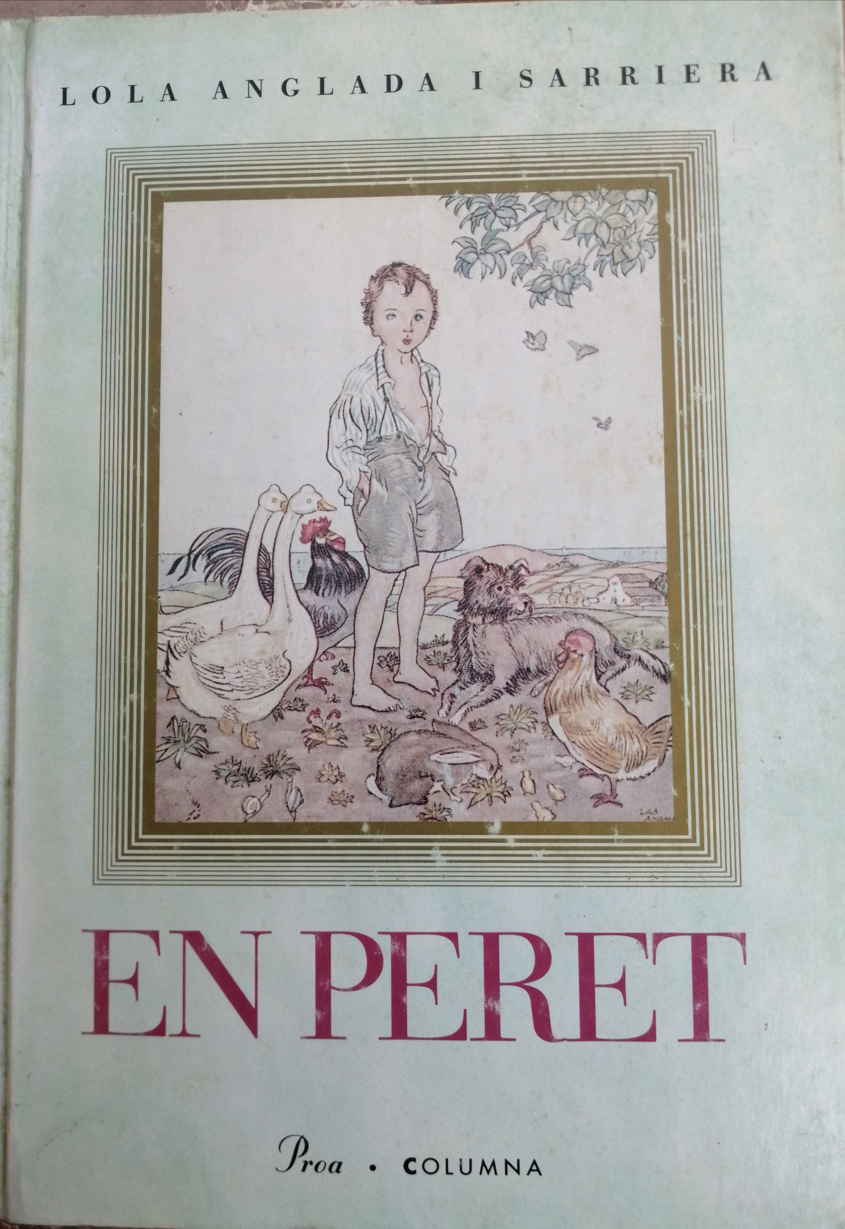 portada del llibre